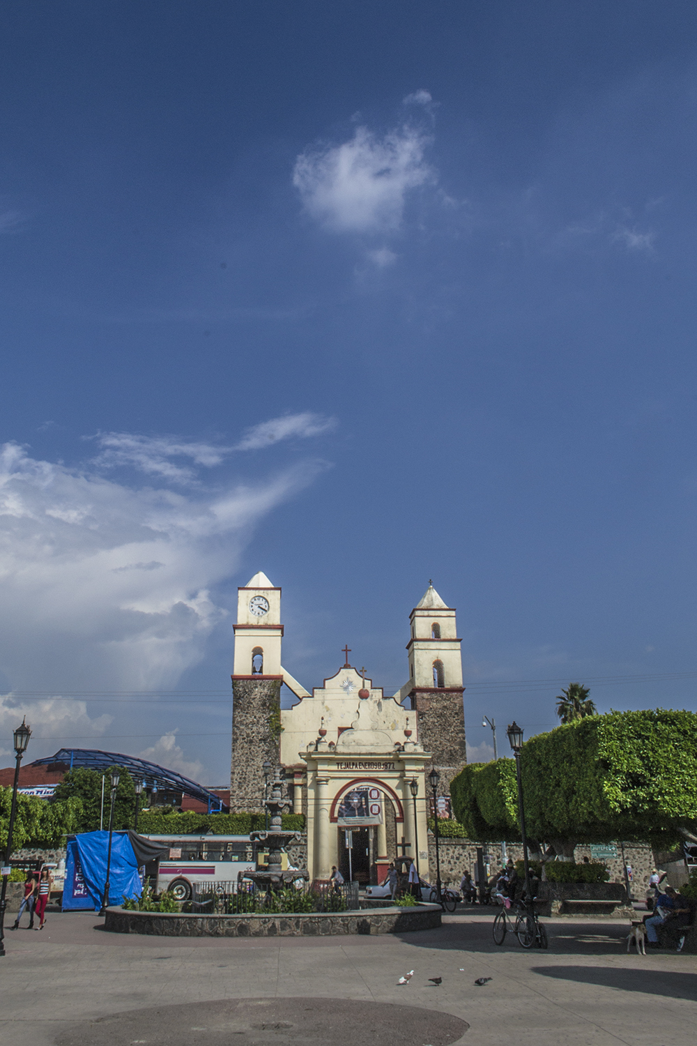 Parroquia de la Asunción de María, vista desde el zócalo de Tejalpa, Jiutepec, Morelos.